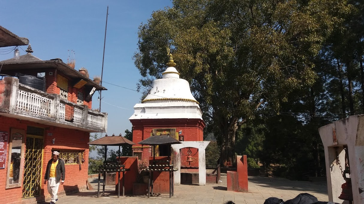 नेपाली: सुवर्णेश्वर महादेव, भक्तपुर